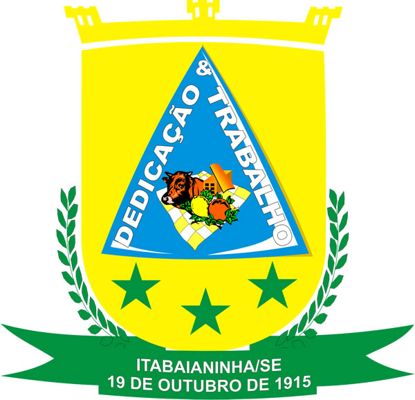 Brasão Município de Itabaianinha, Sergipe